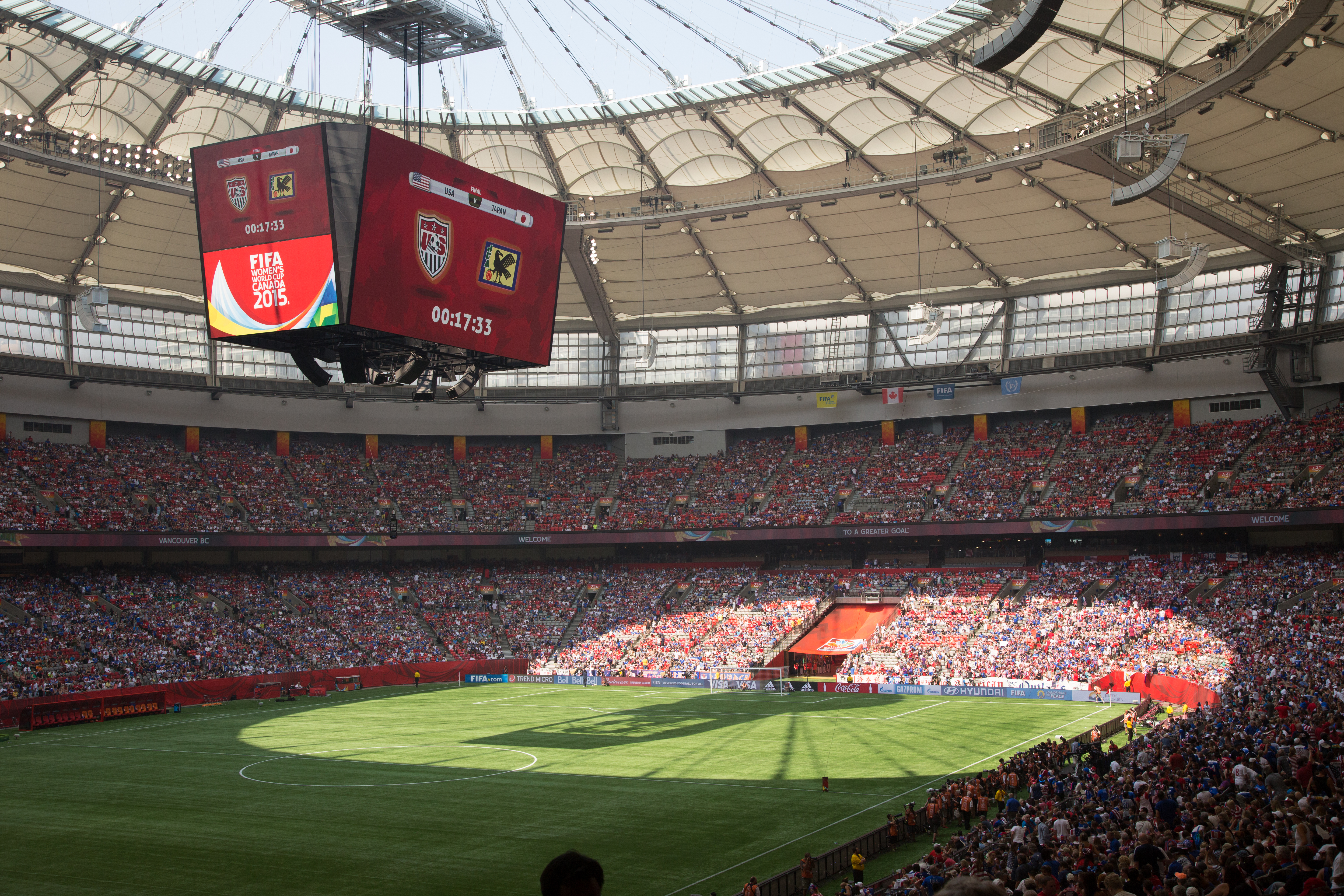 BC Place